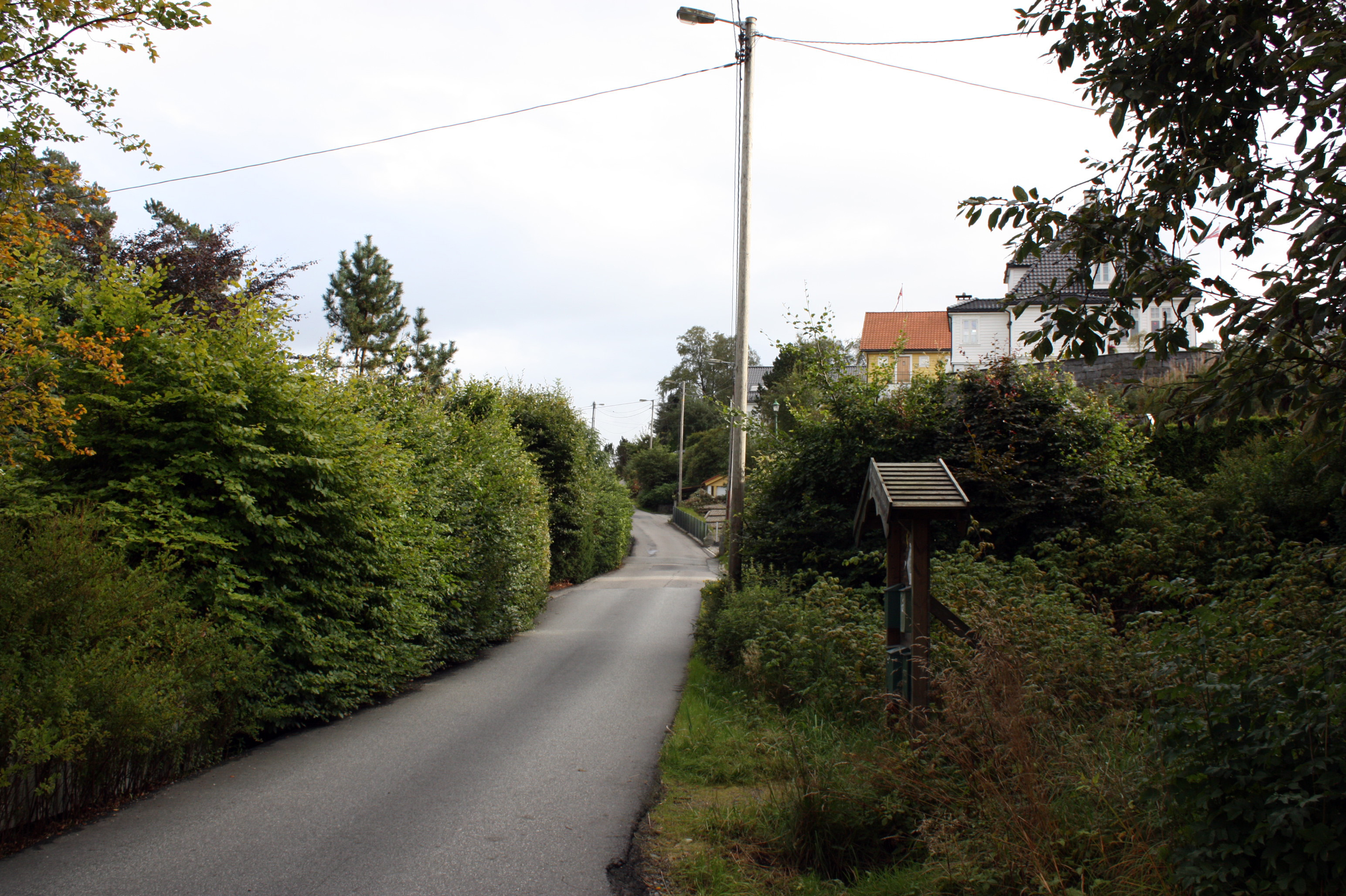 Nybøvegen, Fana, Bergen.